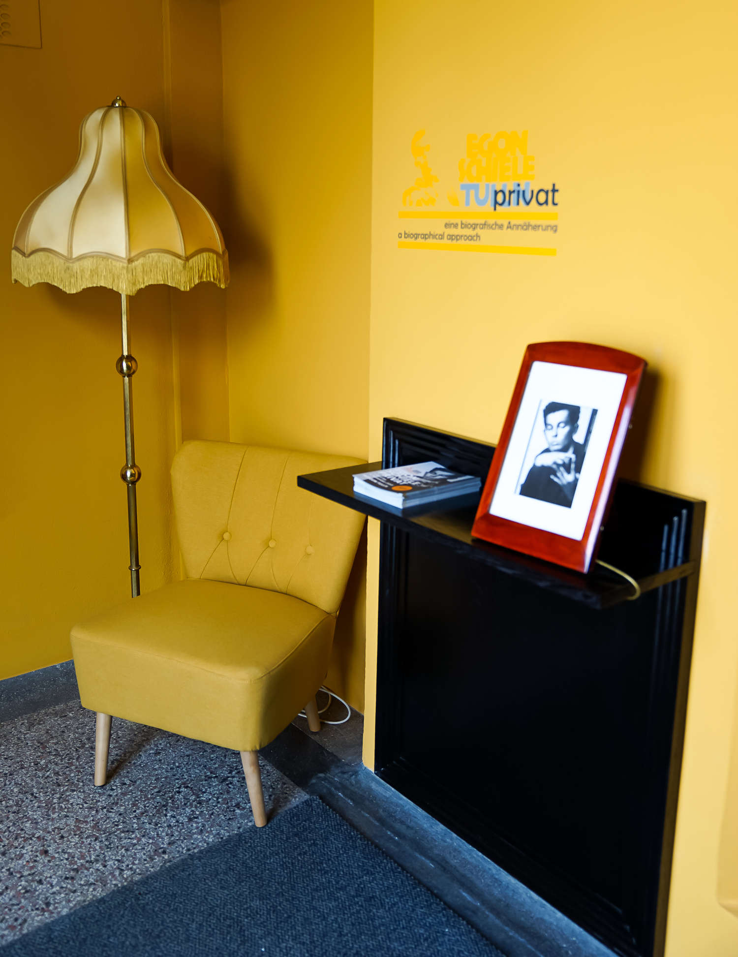 Innenansicht Egon Schiele Museum Foto: Daniela Holzer